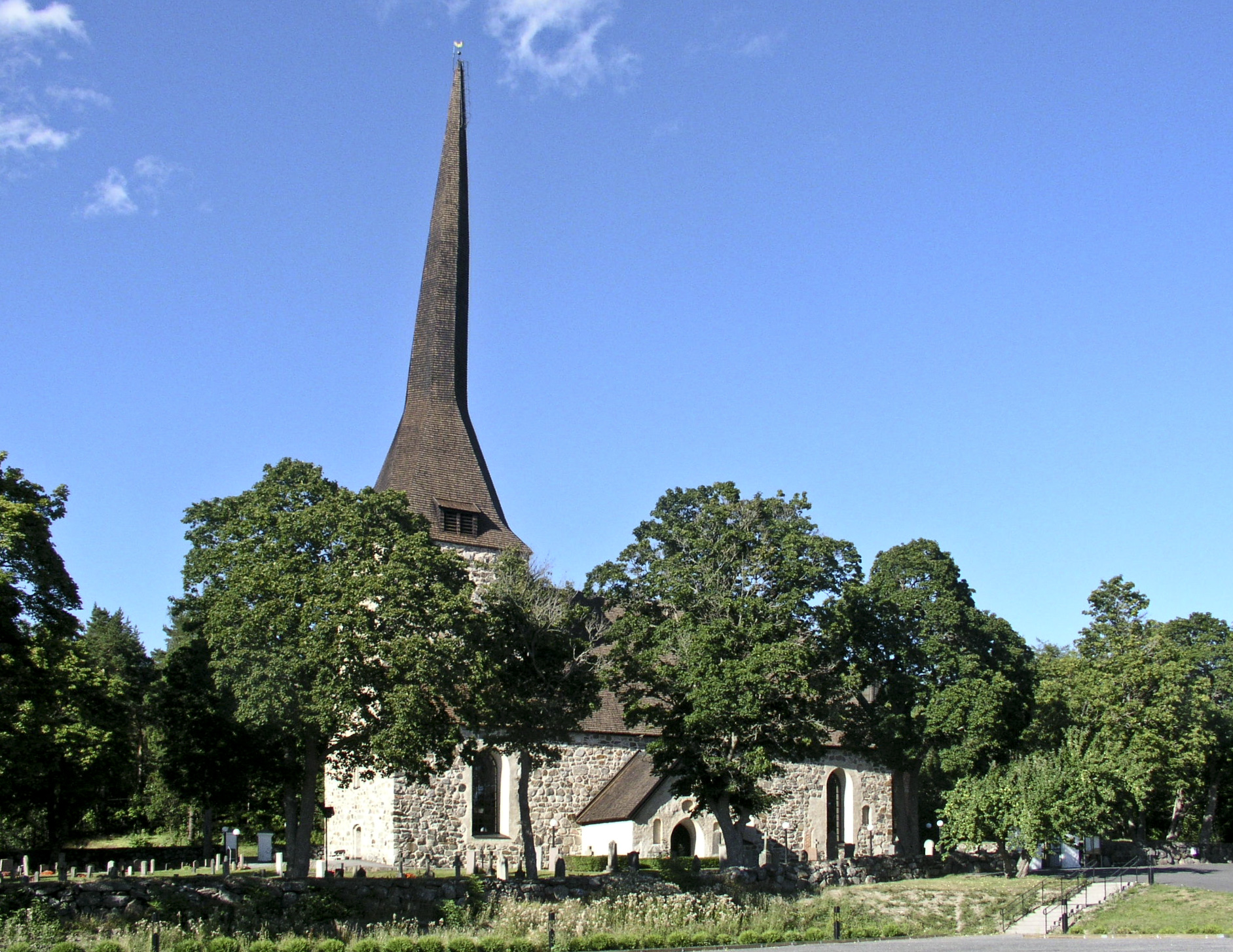 Österhaninge kyrka. Sweden.